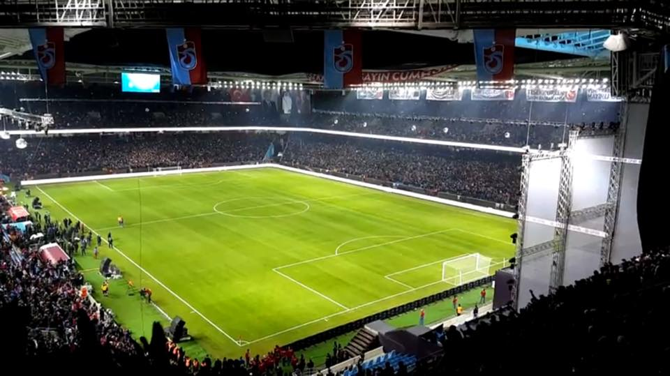 Akyazı stadı